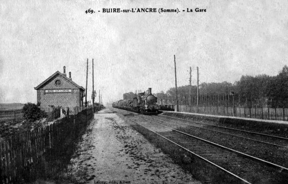 L'intérieur de la gare de Buire-sur-l'Ancre, de la ligne de Paris à Lille, vers 1900.